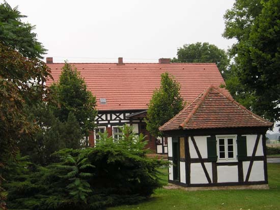 Historisches Bienenhaus in Neulietzegöricke auf dem "Kleinen Anger" ([1]) Ort: Neulietzegöricke